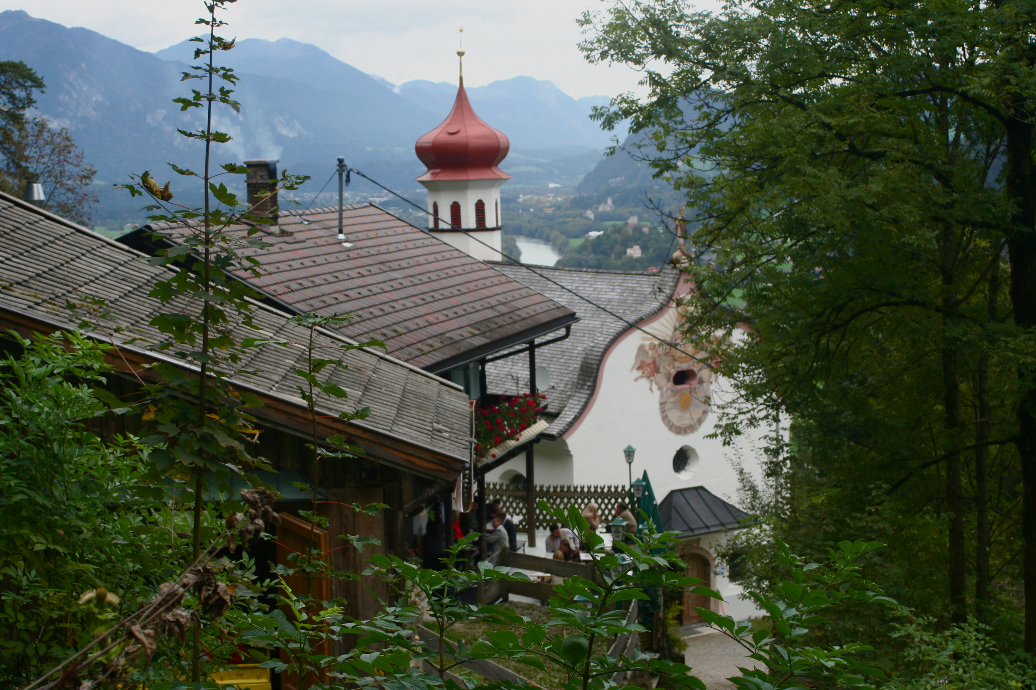 Der Wallfahrtsort und die ehemalige Einsiedelei Maria Brettfall bei Strass im Zillertal, Tirol, Österreich